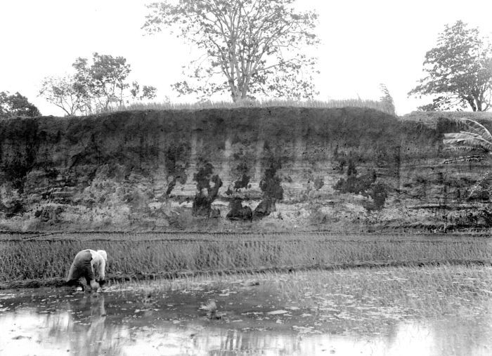 Negatief. Op de zuidhelling van de Tjeremai zijn tuflagen te zien met onder in het profiel een laag van diatomeëen-aarde uit een oude meerafzetting bij Darma, Cheribon, Midden-Java